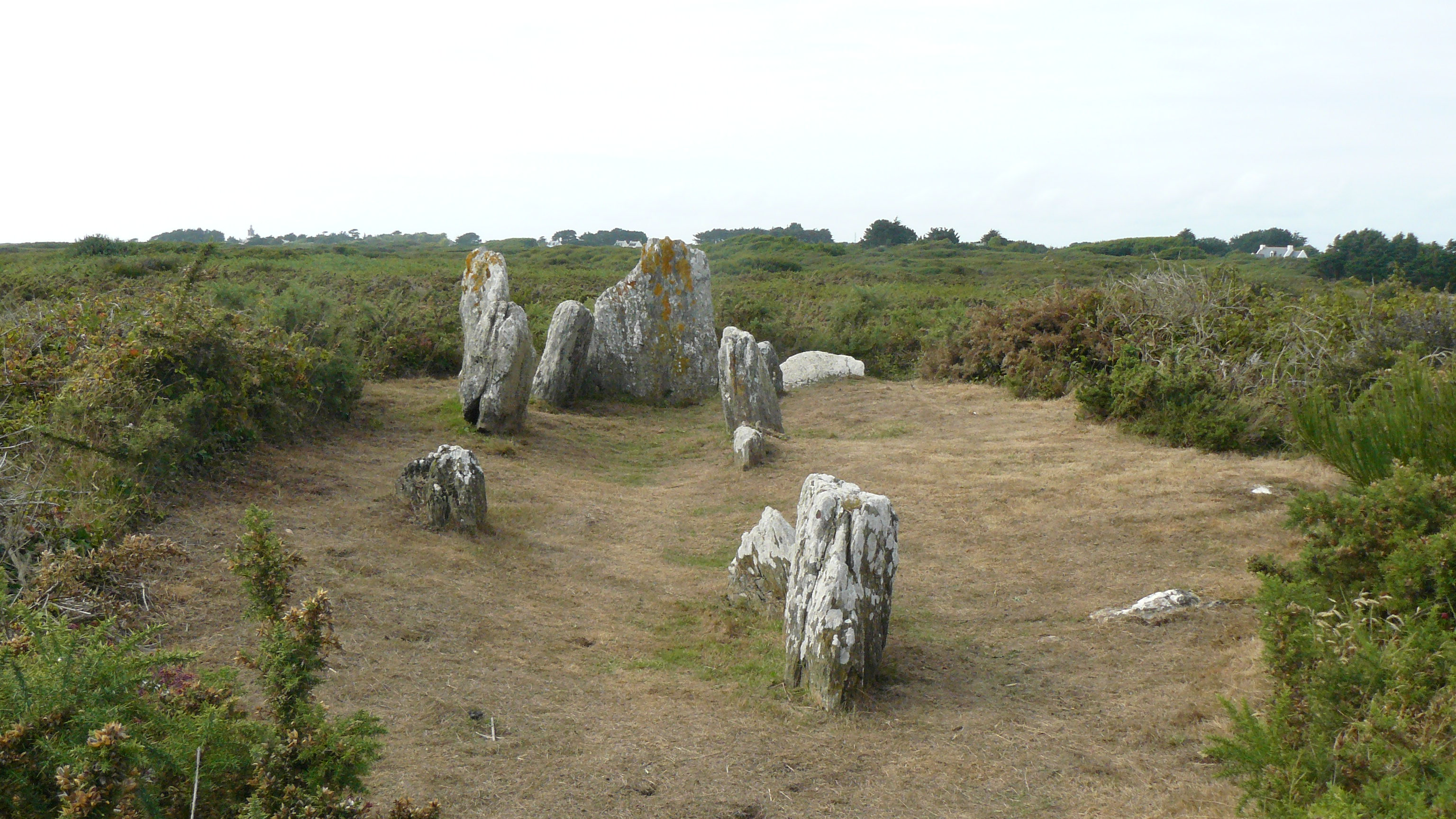 Dolmen Men kam situé près du hameau de Kerlard. Il date du 4e millénaire avant JC D'après l'écomusée.